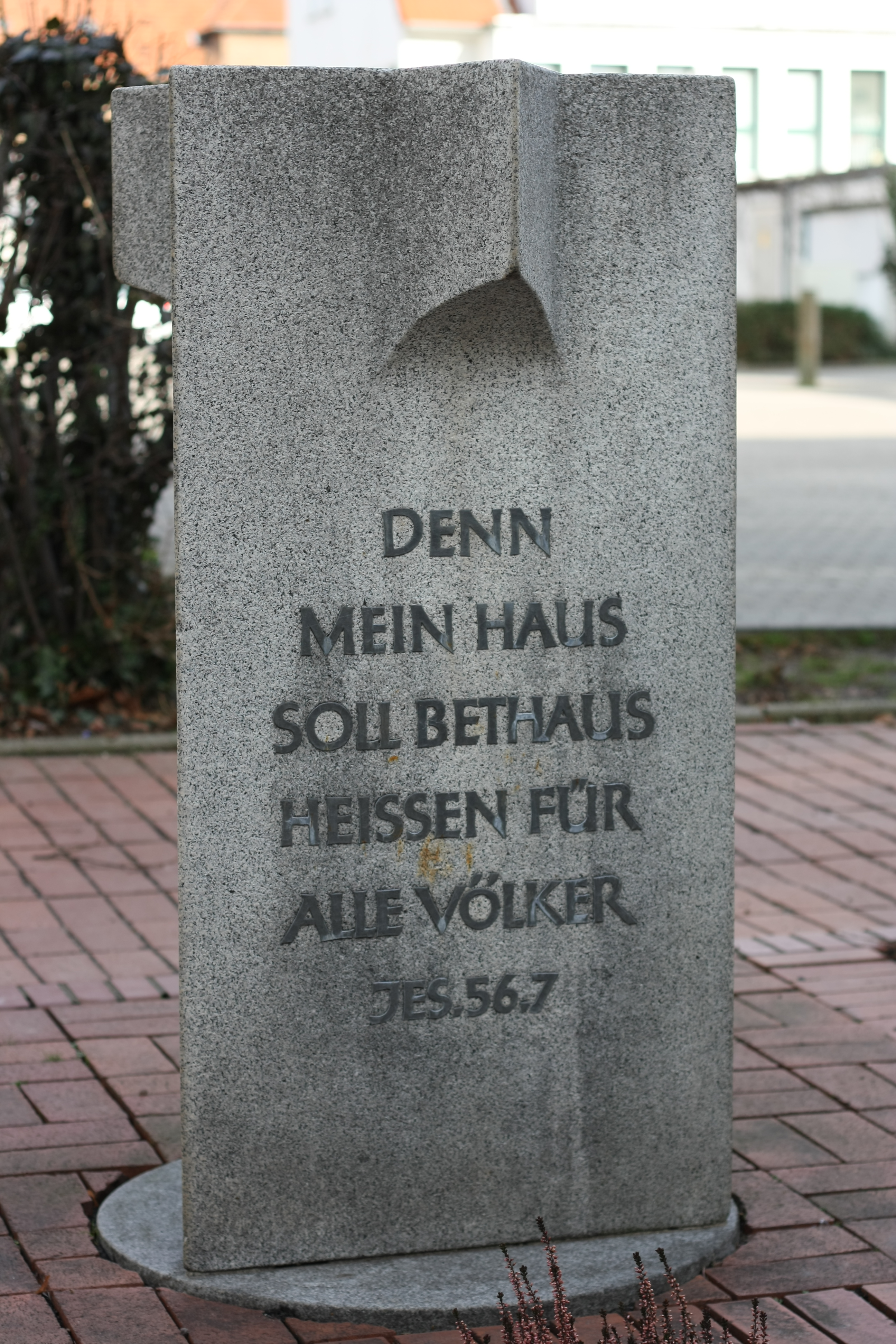 Gedenkstein in Meckenheim zur Erinnerung an die Synagoge, Inschrift: Denn mein Haus soll Bethaus heißen für alle Völker Jes. 56.7, Prof. Scheebenstraße